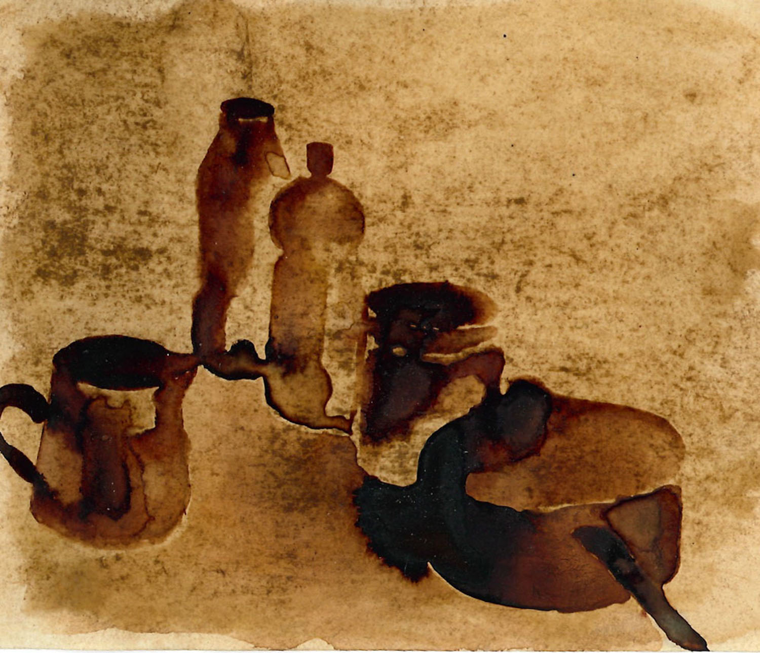 Без назива, Акварел, 2015. 13 х 11, уметничко дело аутора Данице Веселиновић Лиценцирање Template:Za ostavu